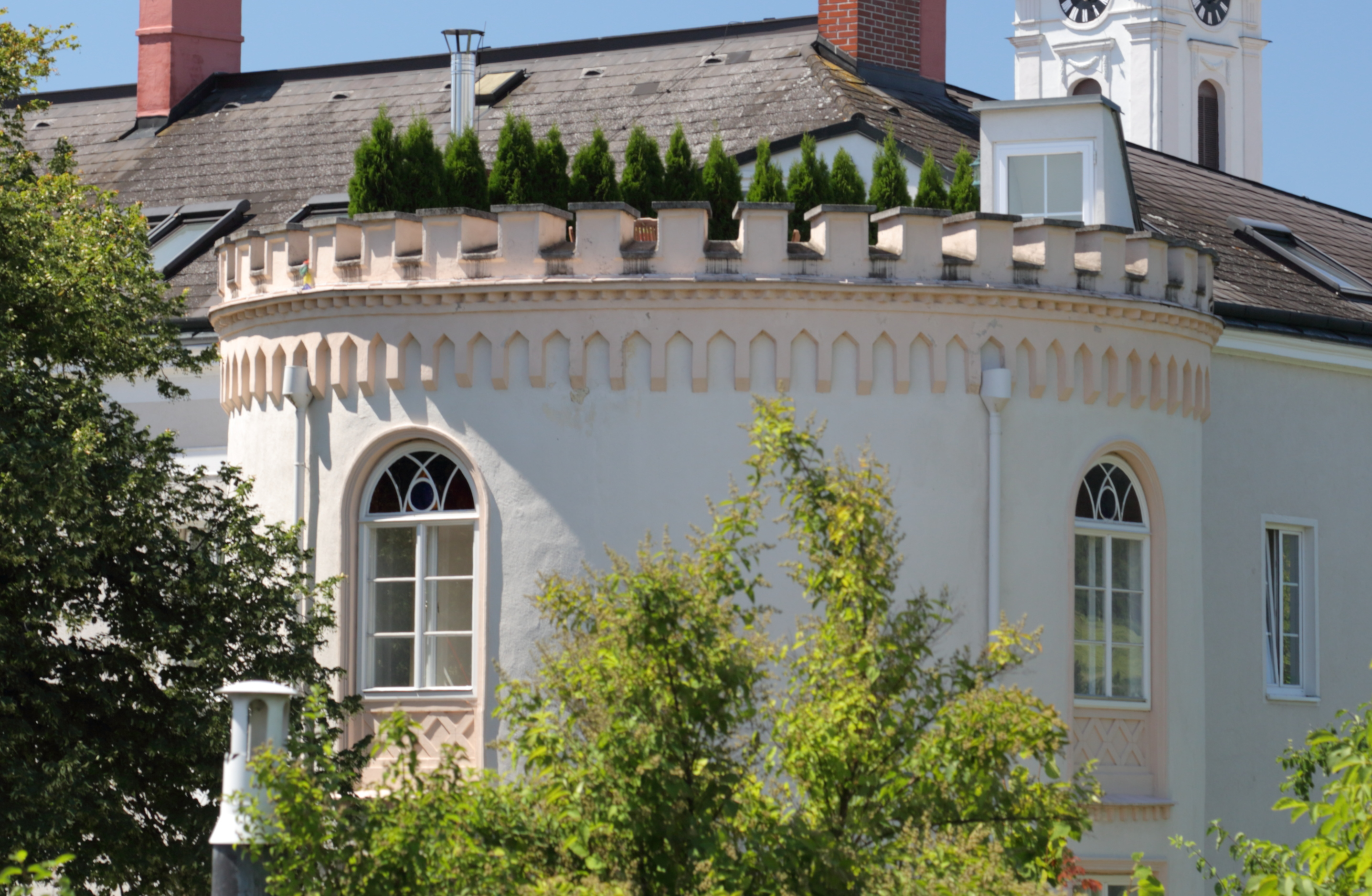 Urfahrturm